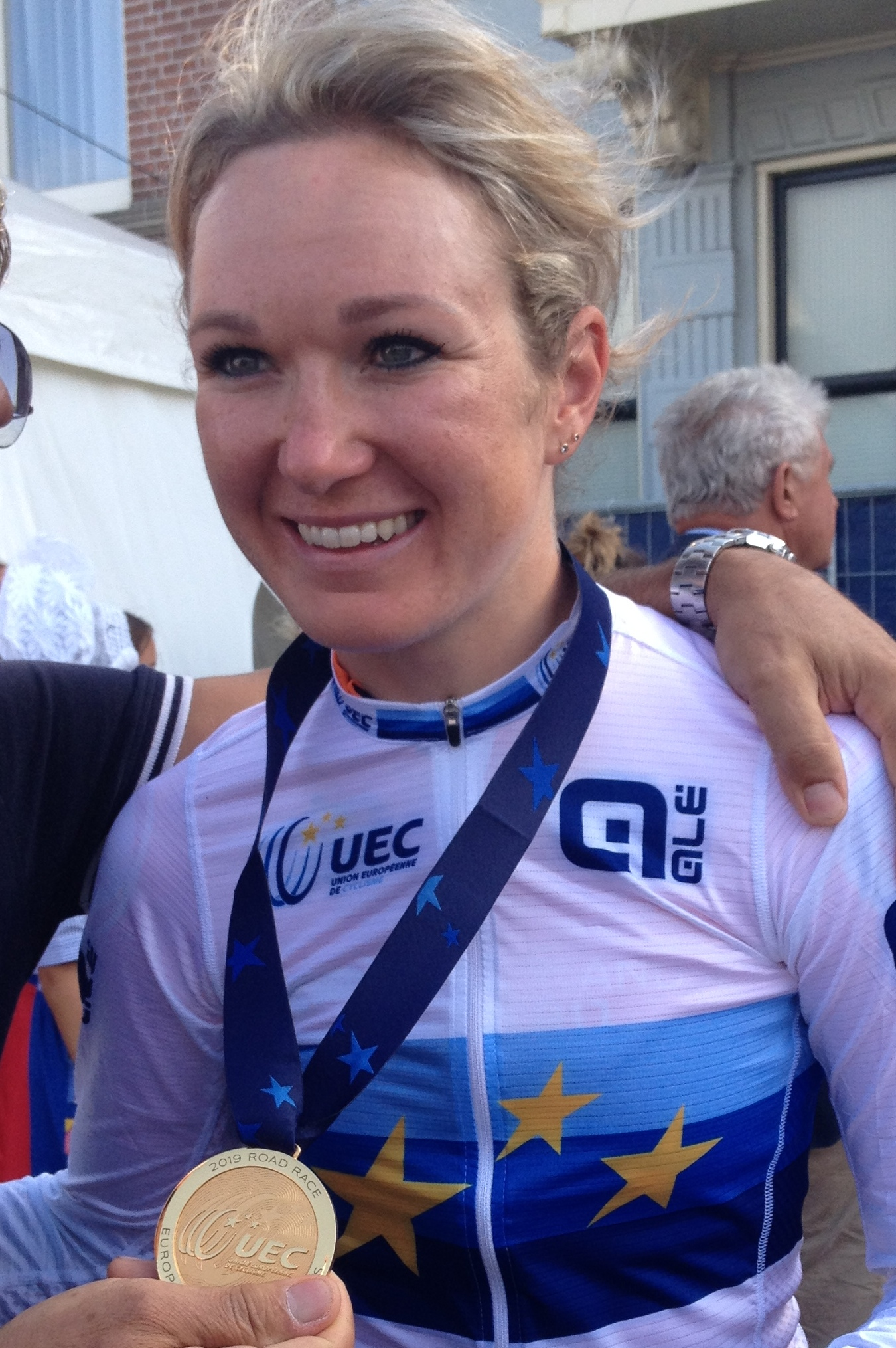 Wegwedstrijd voor vrouwen elite tijdens de Europese kampioenschappen wielrennen in Alkmaar op zaterdag 10 augustus 2019.